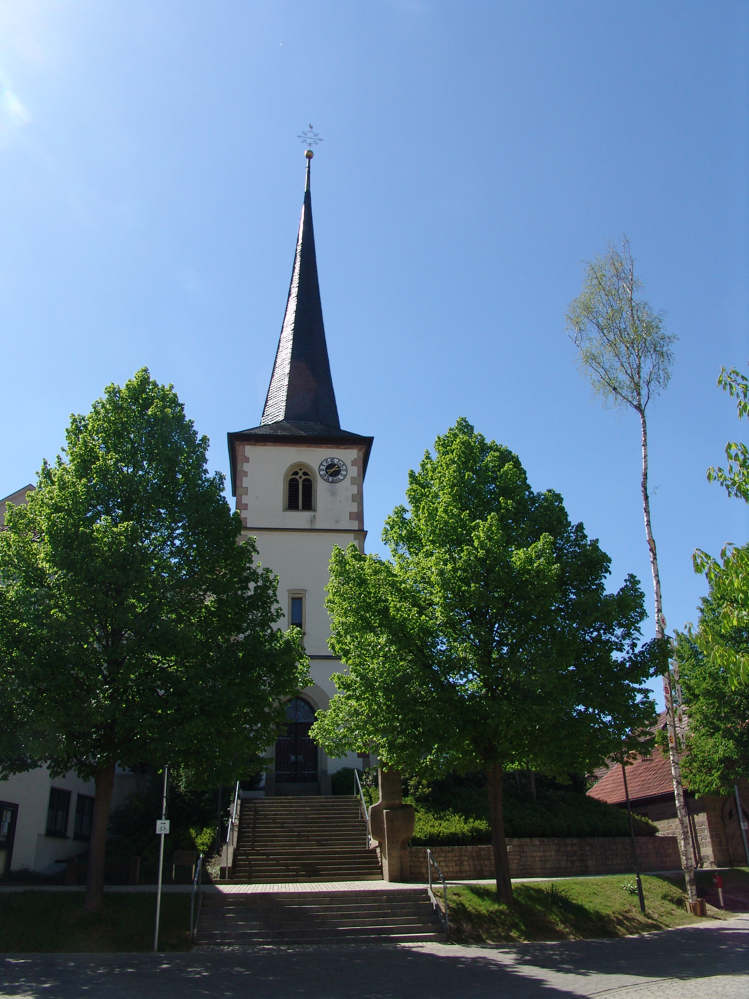 Oberwern - katholische Kirche St. Batholomäus, Saalbau mit eingezogenem Chor, Turm 1608, Langhaus 1891This is a photograph of an architectural monument.